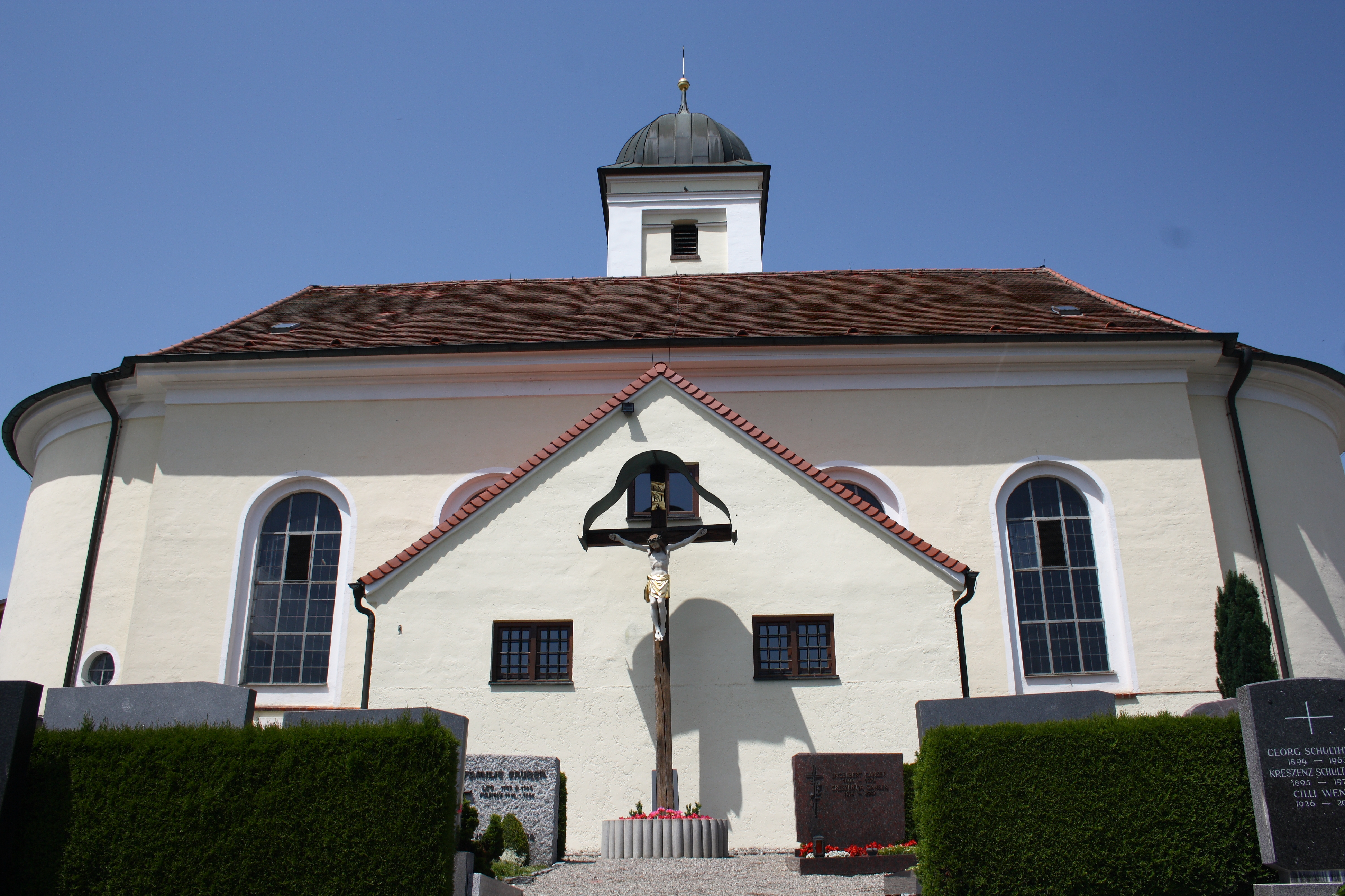 Katholische Pfarrkirche St. Margareth in Röfingen im Landkreis Günzburg (Bayern), spätklassizistischer Saalbau von 1823